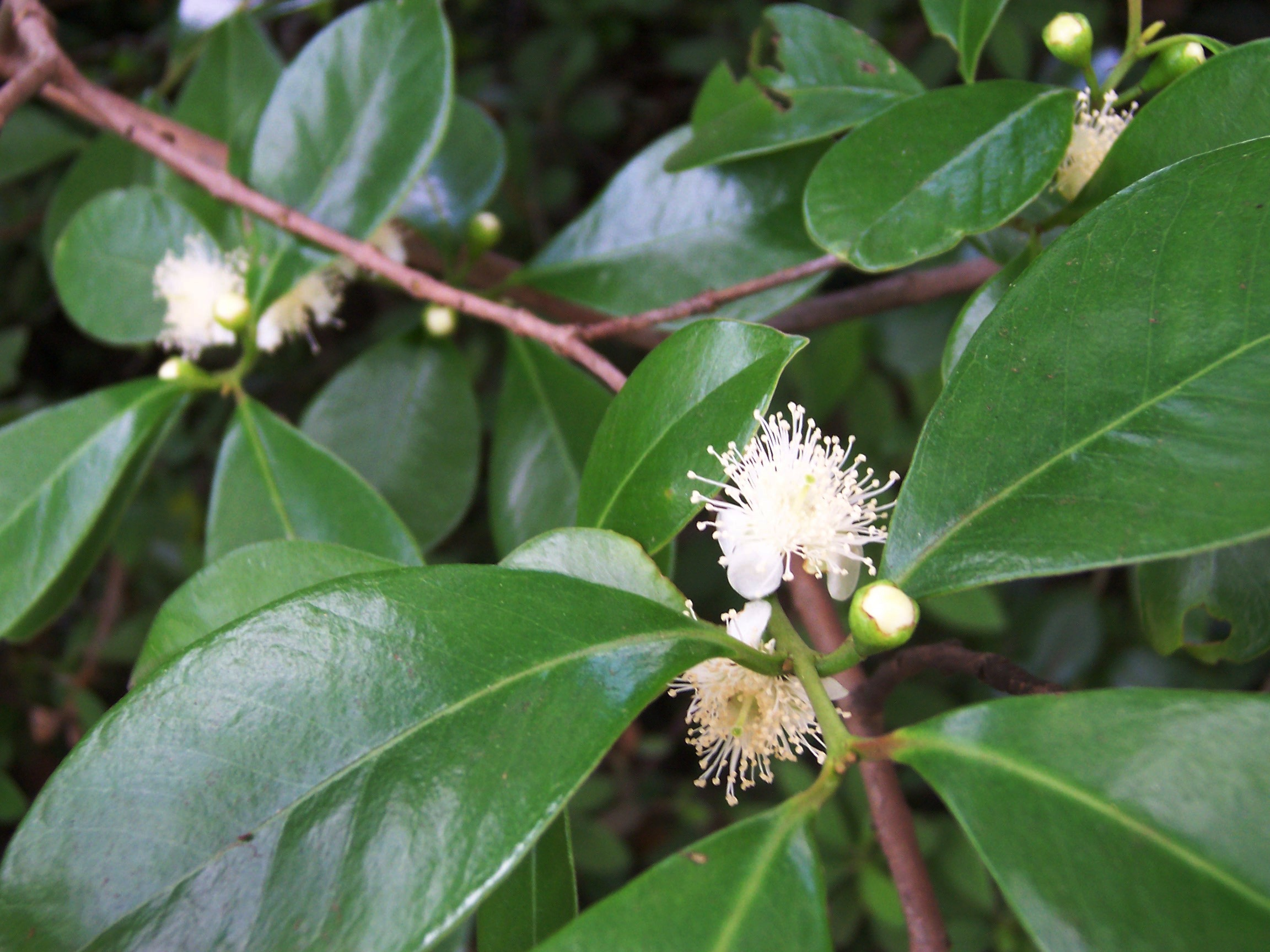 goyavier-fraise (Psidium cattleyanum) - flowers Photo: B.navez - 24 FEB 2006 - Réunion island